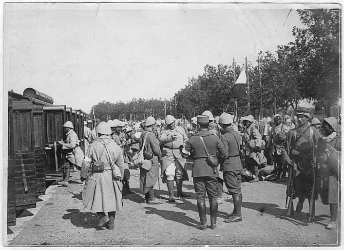 Embarquement pour le front des tirailleurs sénagalais stationnés à Fréjus en 1915.